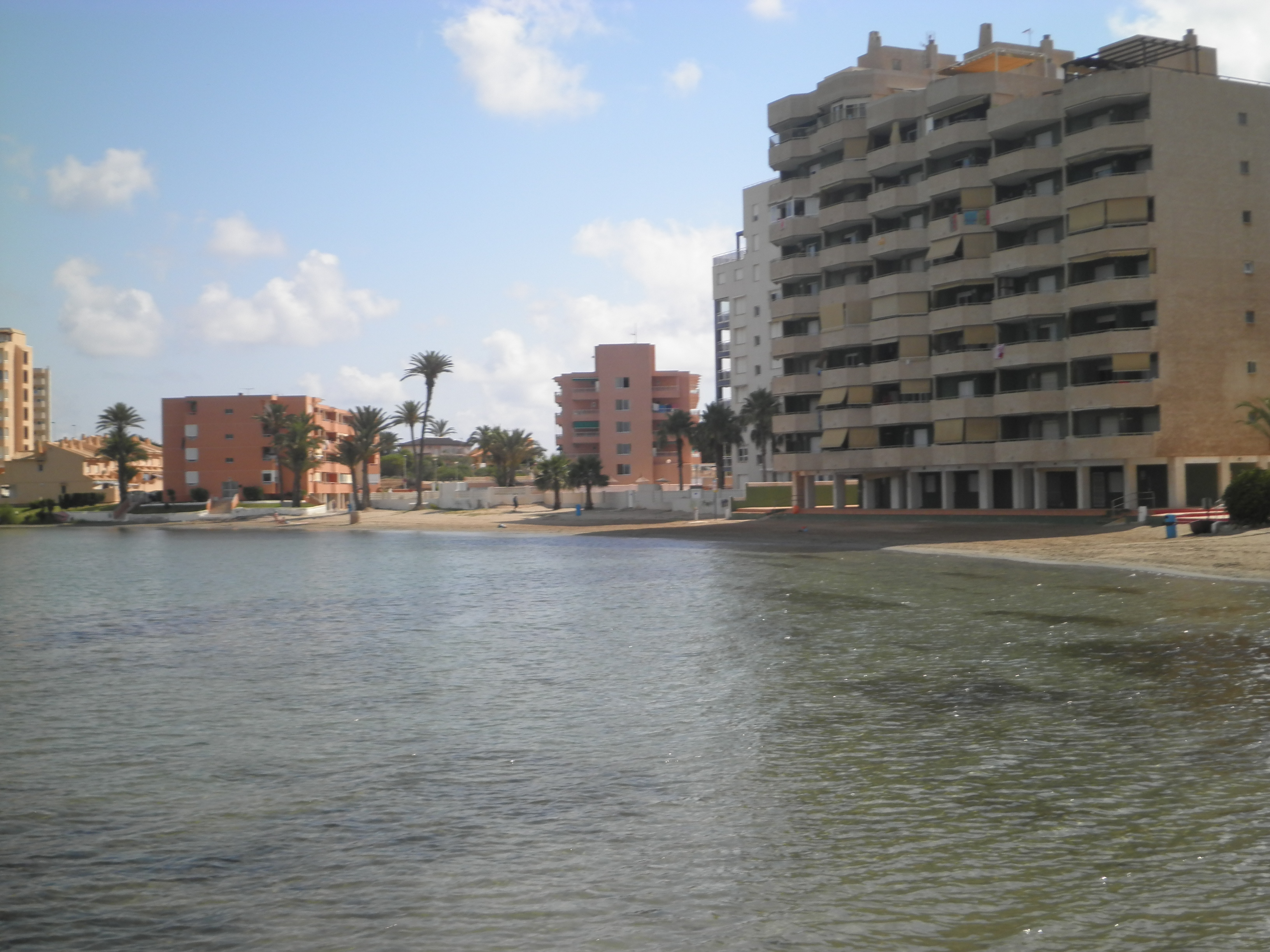 foto descriptiva de playa las antillas